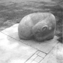 Bundesgartenschau 1957 in Köln - Plastik